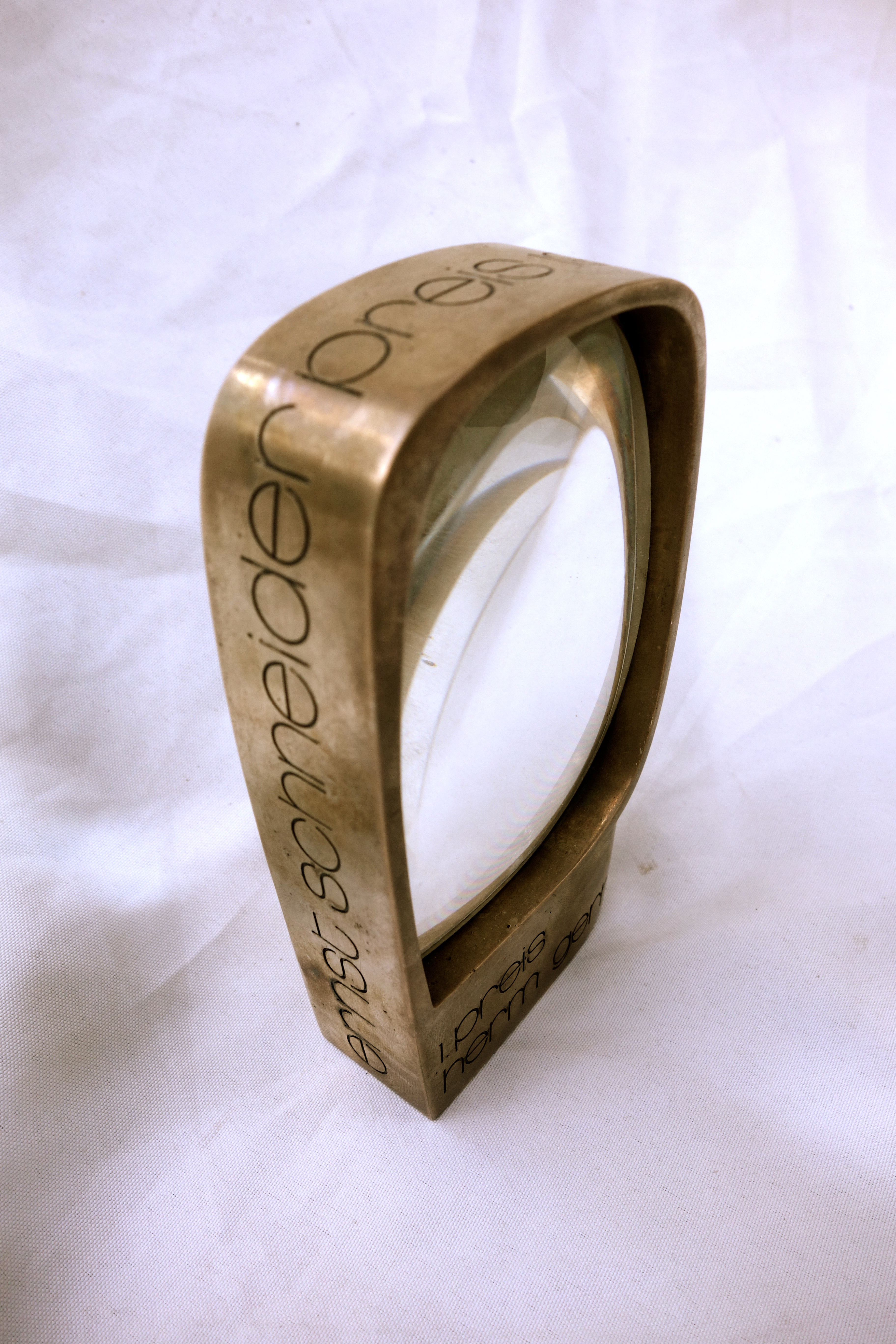 Ernst-Schneider-Preis von 1971 für Gerhard Herm